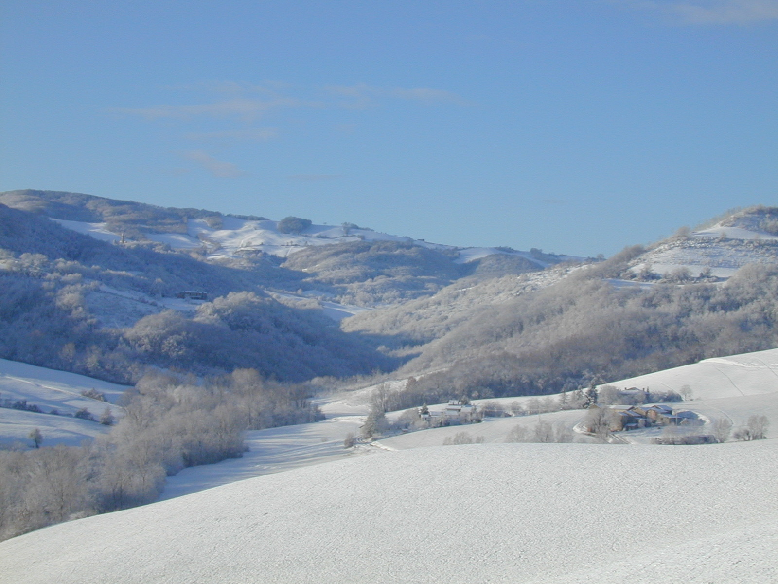 foto mia personale